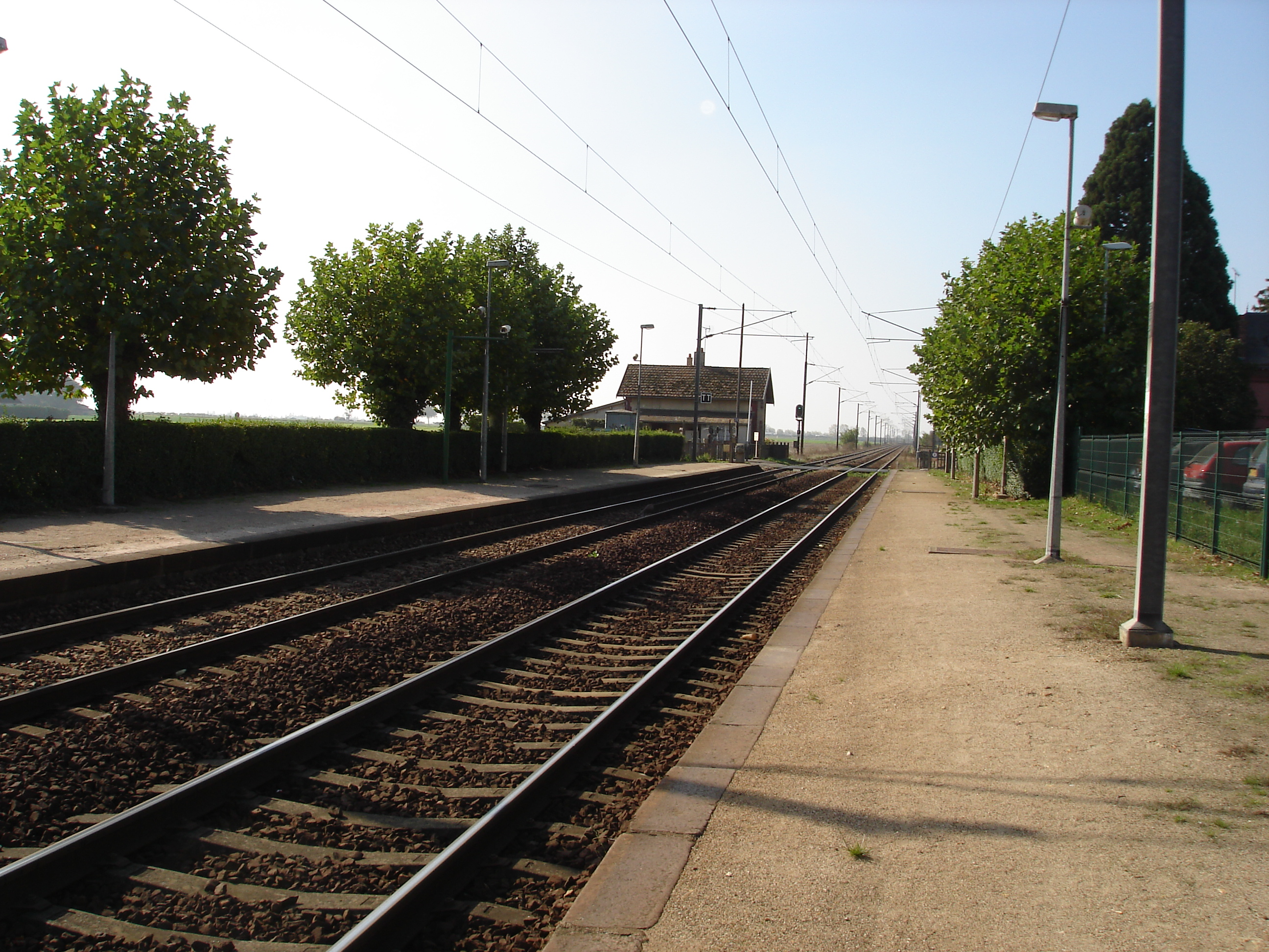 Gare de Marchezais - Broué (28) : Vue en direction de Dreux, de l’extrémités des quais.